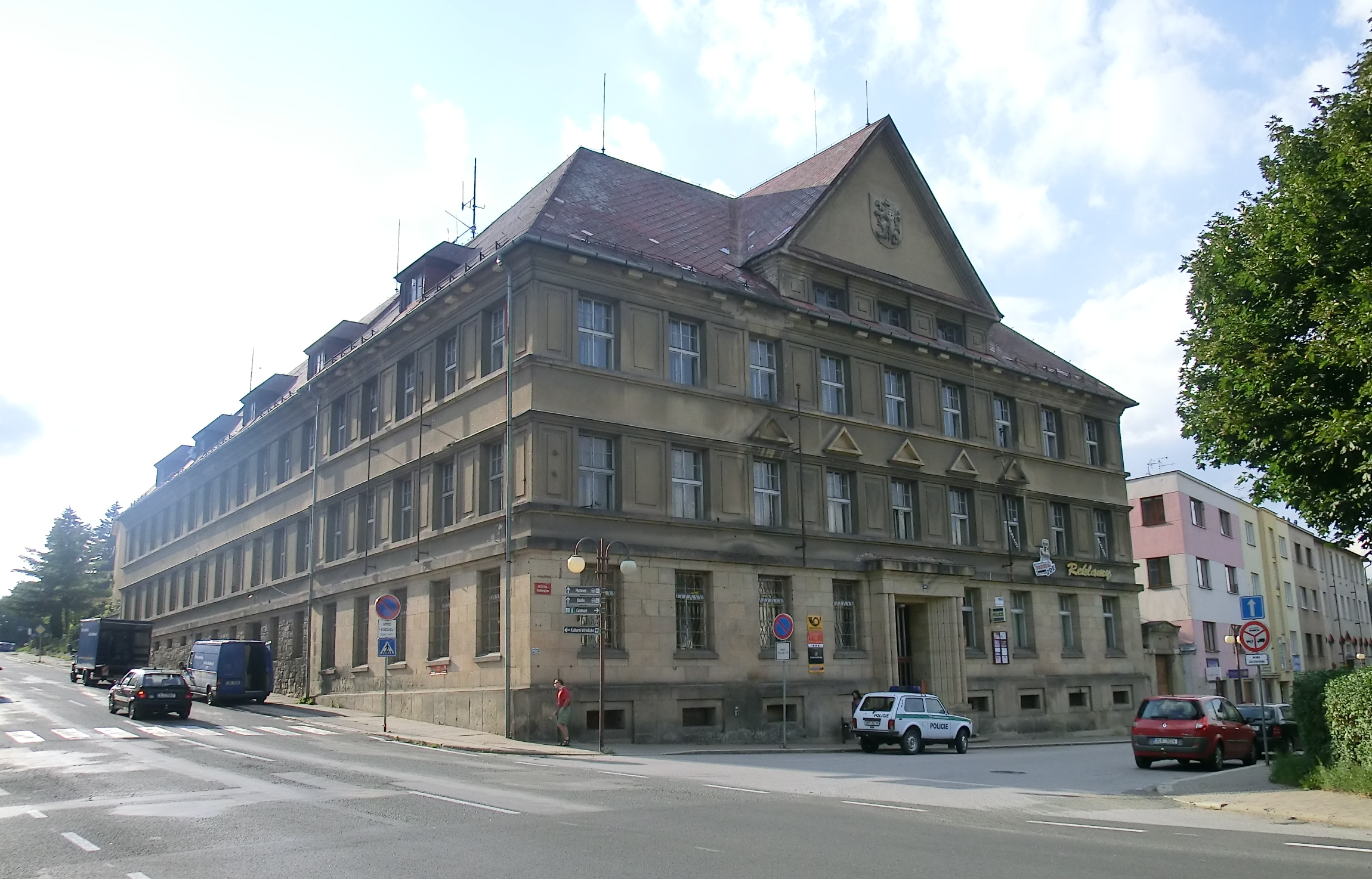 Budova pošty (bývalého Okresního soudu) v Jilemnici